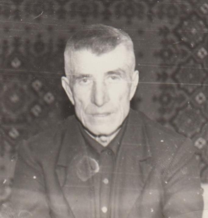 Інвалід Великої Вітчизняної війни Середа Іван Йонович с.Ставок Костопільського району Рівненської області